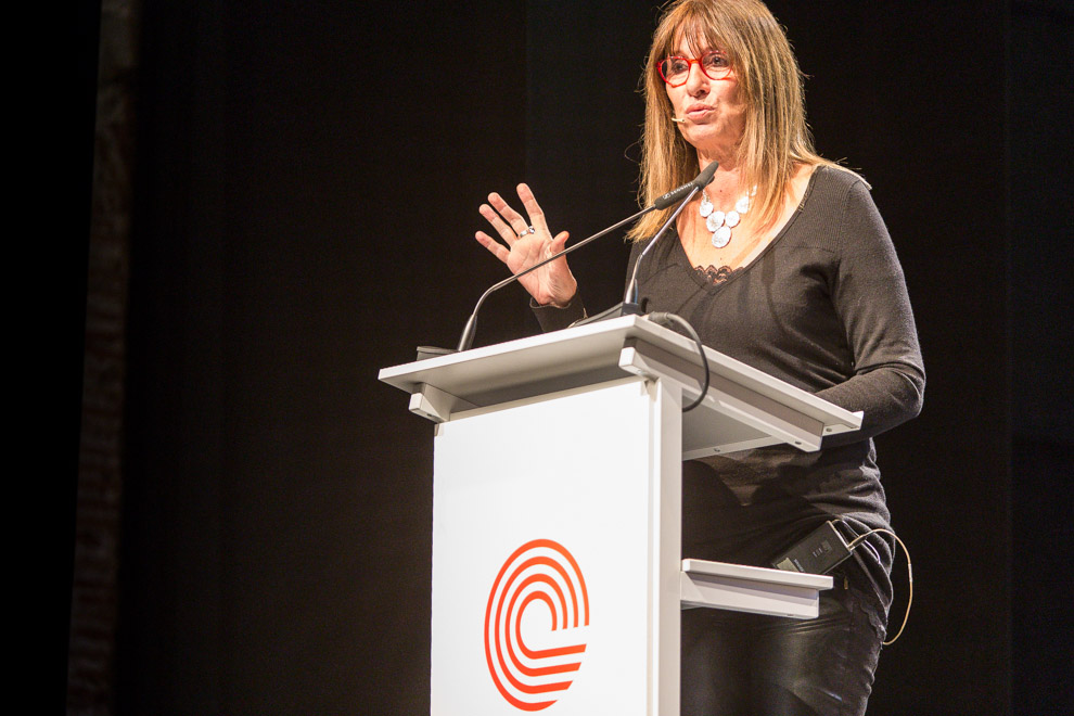 Les Jornades de la Catosfera són un cicle de xerrades en clau tecnològica que pretenen posar de manifest la Internet catalana i la seva activitat en les xarxes socials i les formes de comunicació 2.0.